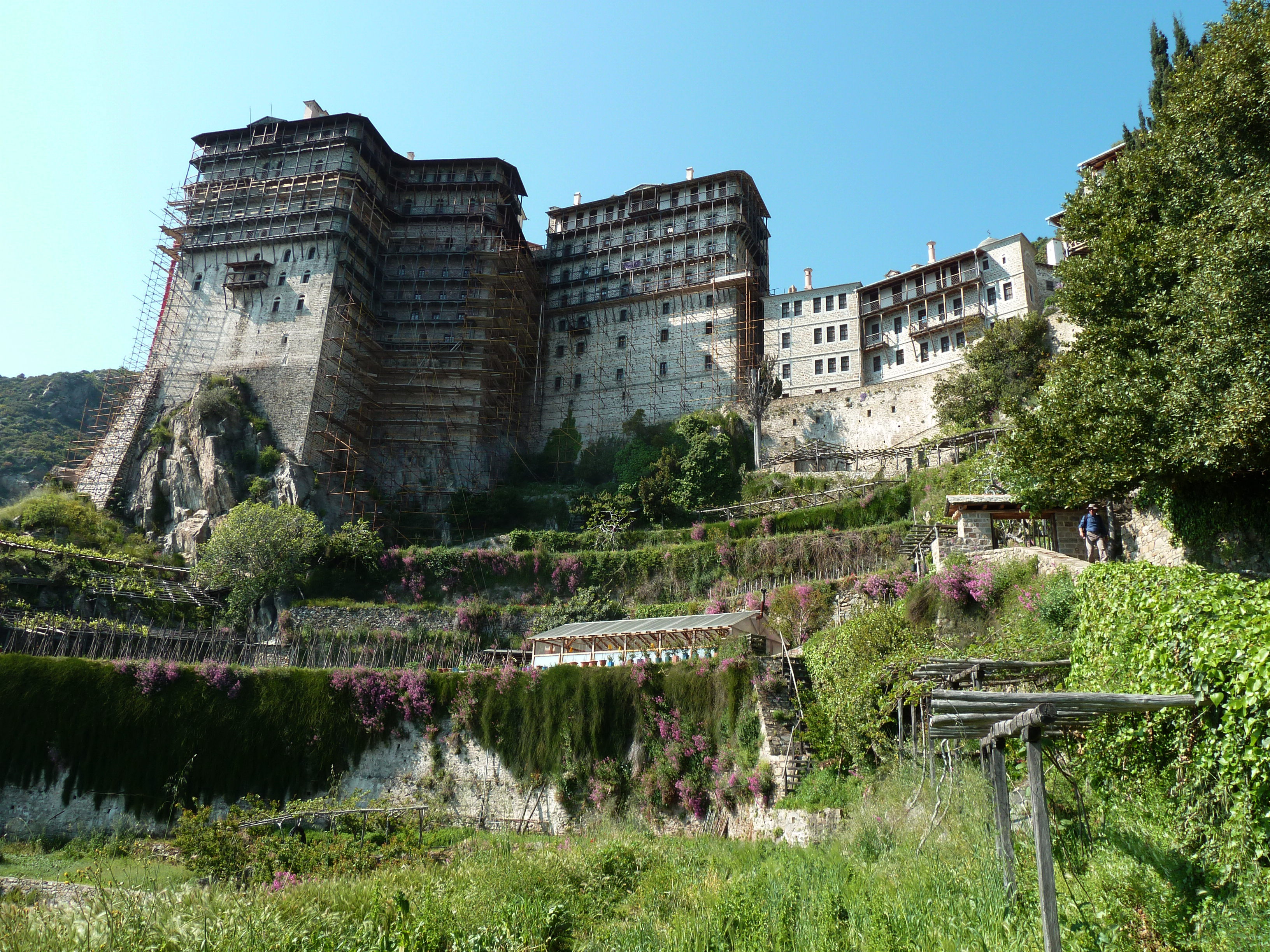 Vue sur le monastère de Simonos Petras (Mont Athos)